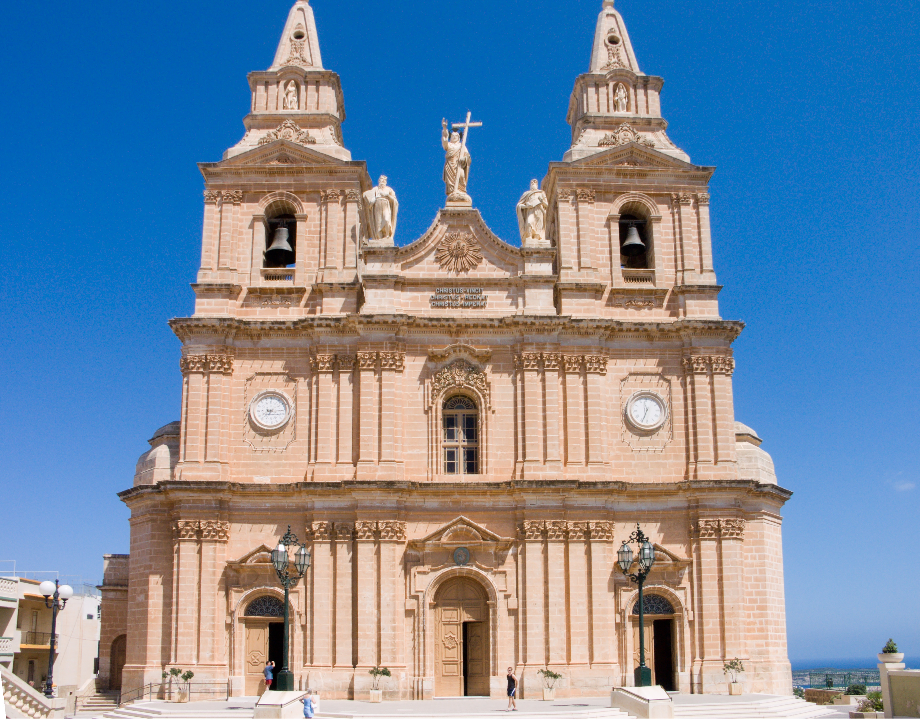 Notre Dame de Melheia à Malte